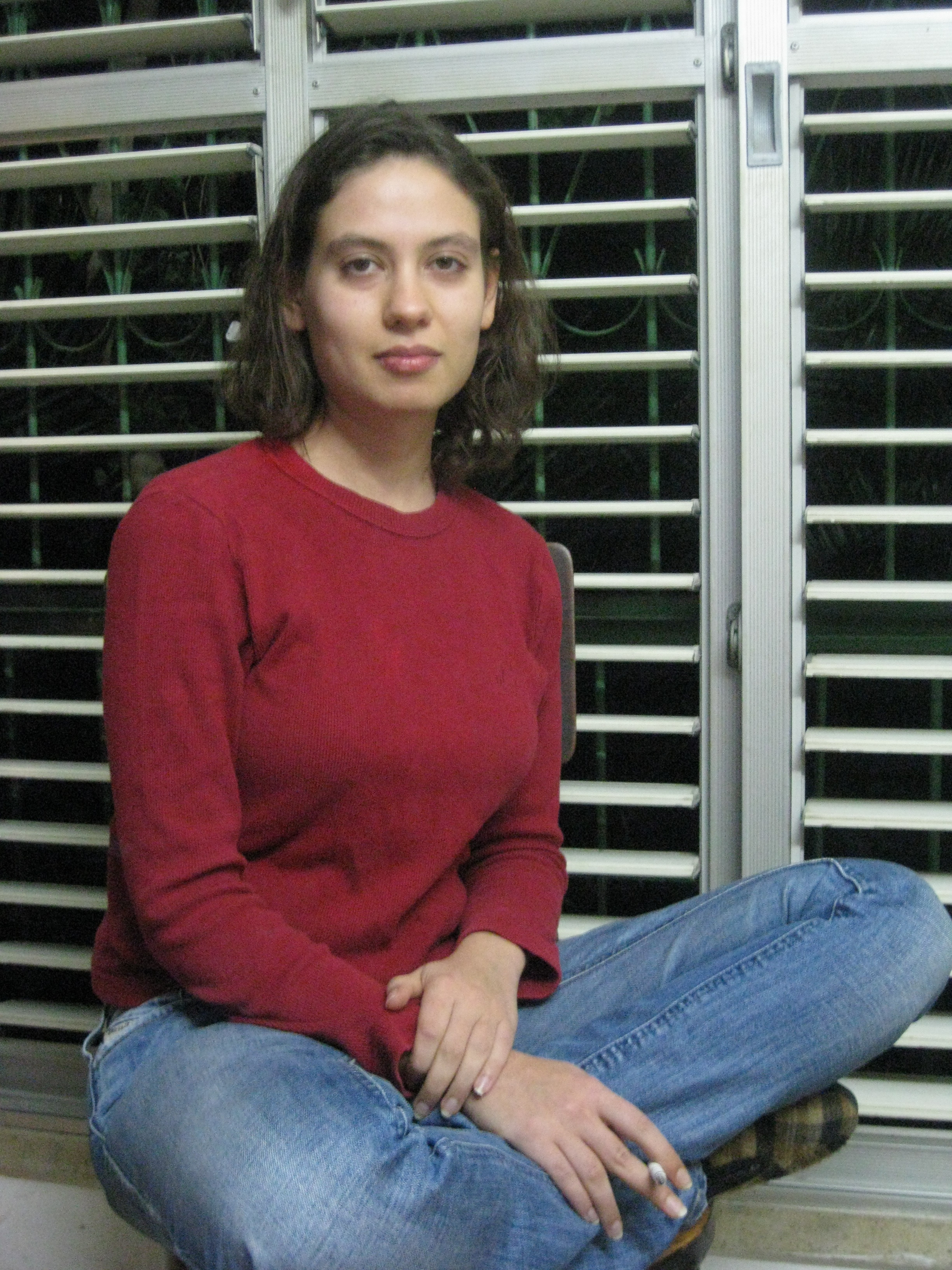 he:ענת קם